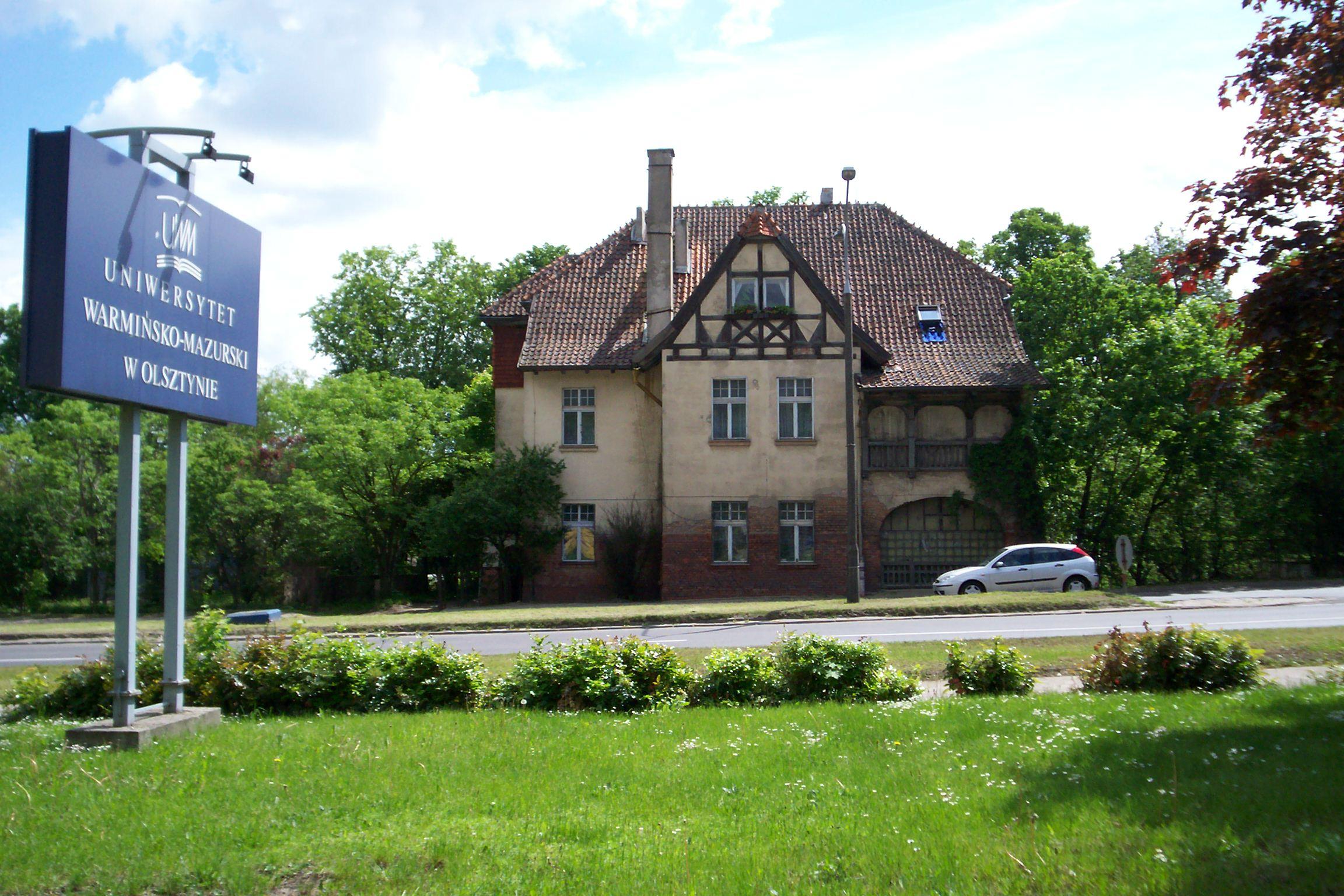 Olsztyn, budynek przy ul. Warszawskiej, na wysokości pętli autobusowej w Kortowie